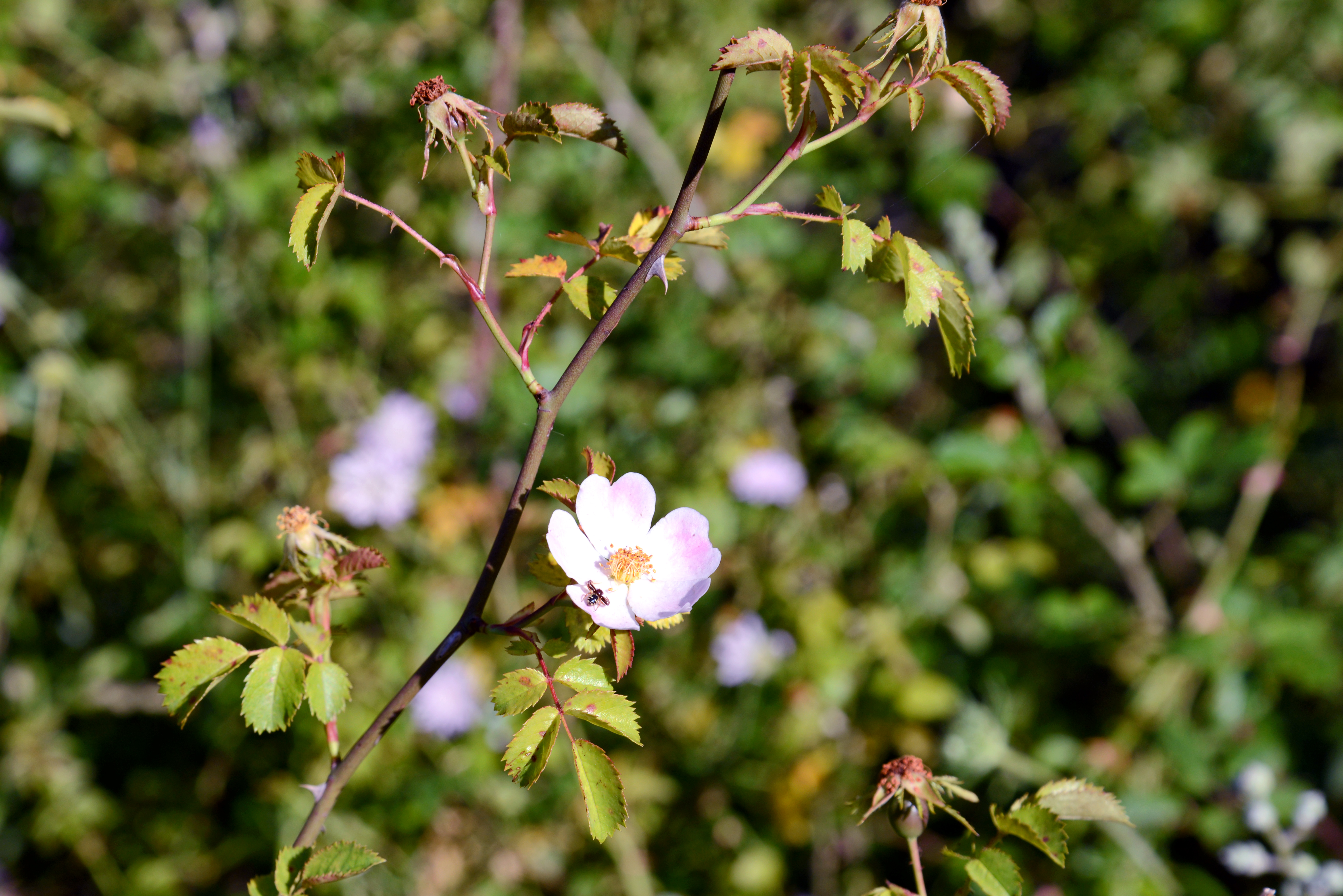 Asco (Corse) - Églantier de Pouzin (Rosa pouzinii)